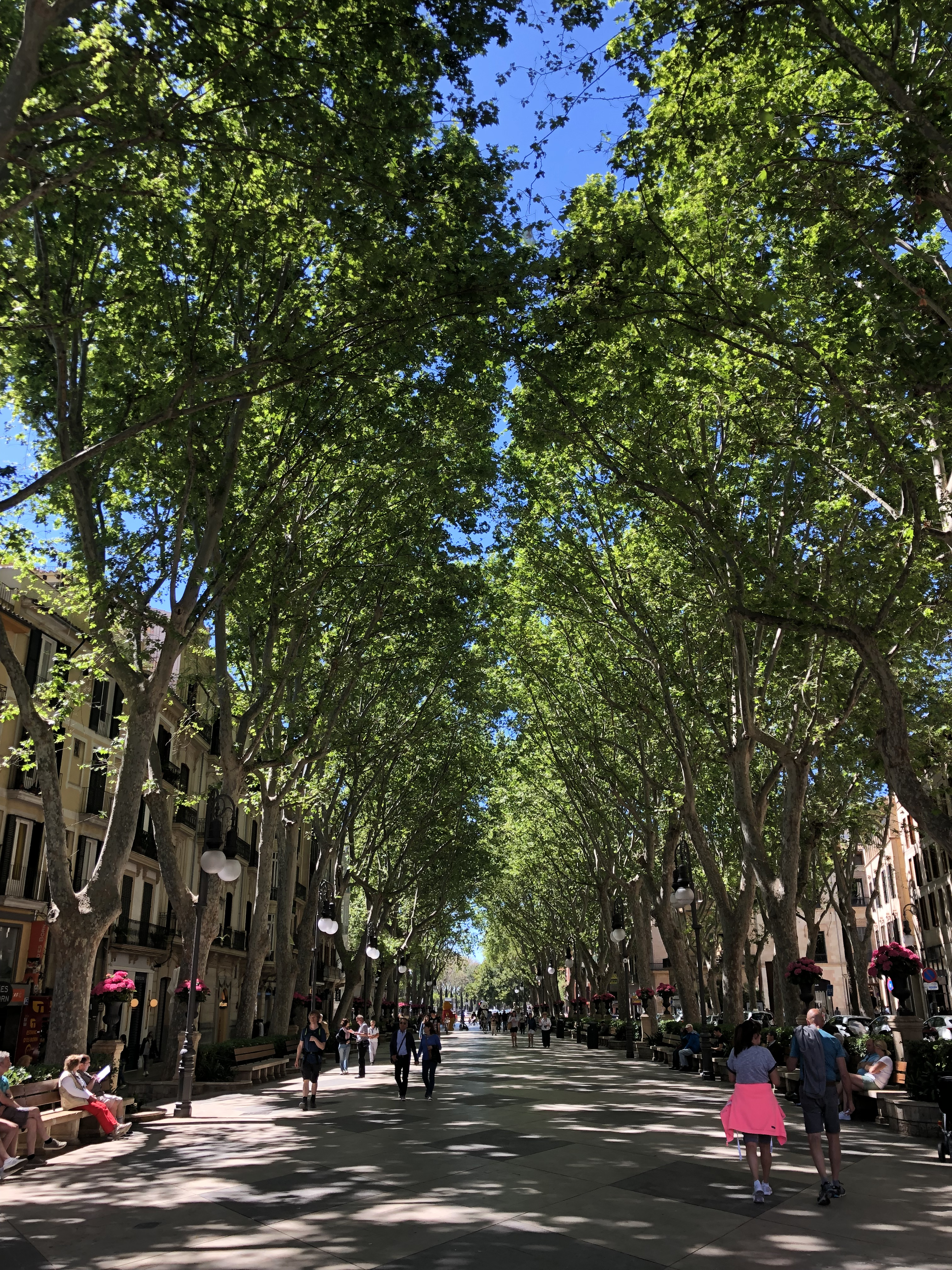 Palma de Mallorca deptak